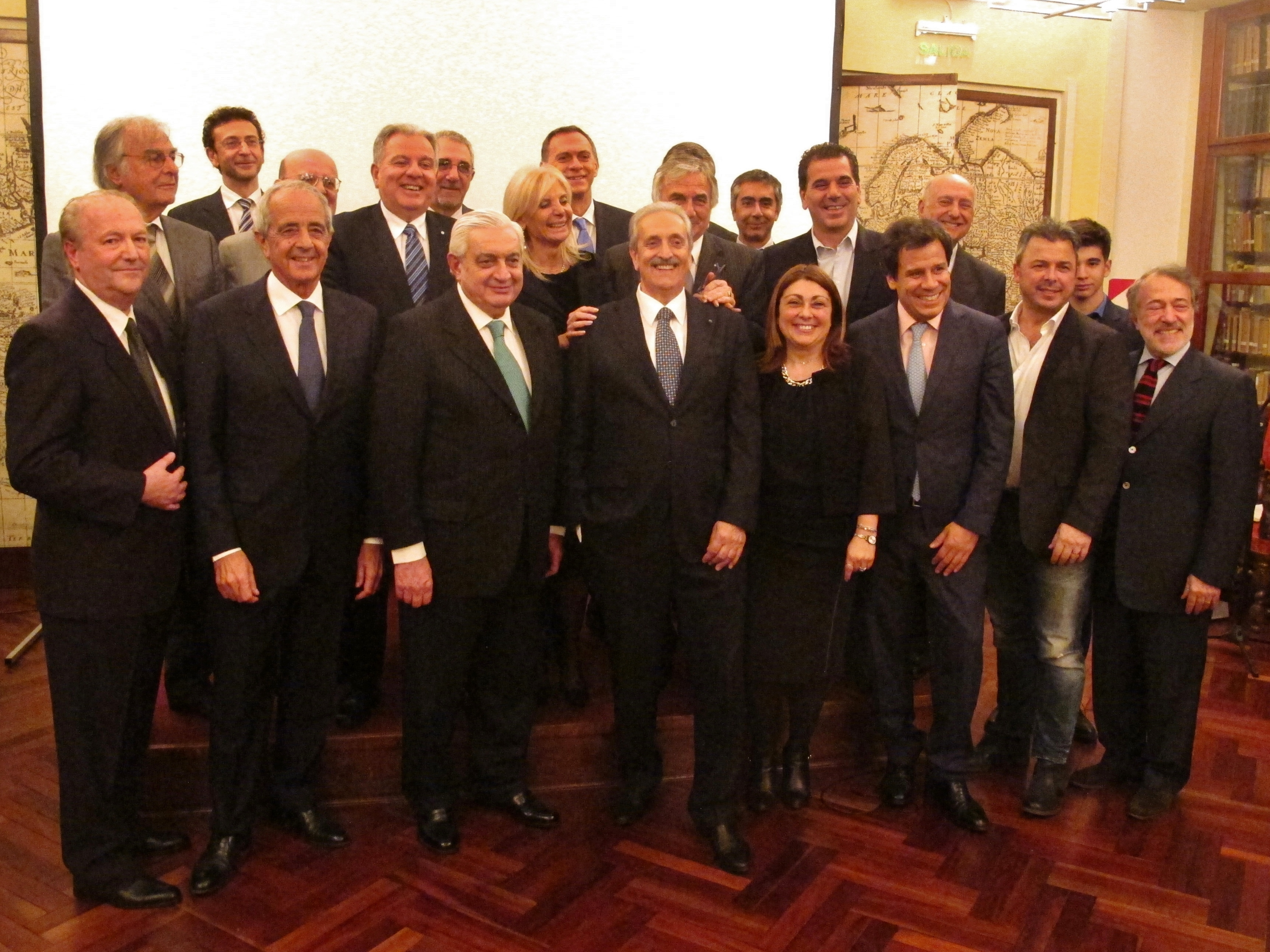 I premiati della terza edizione